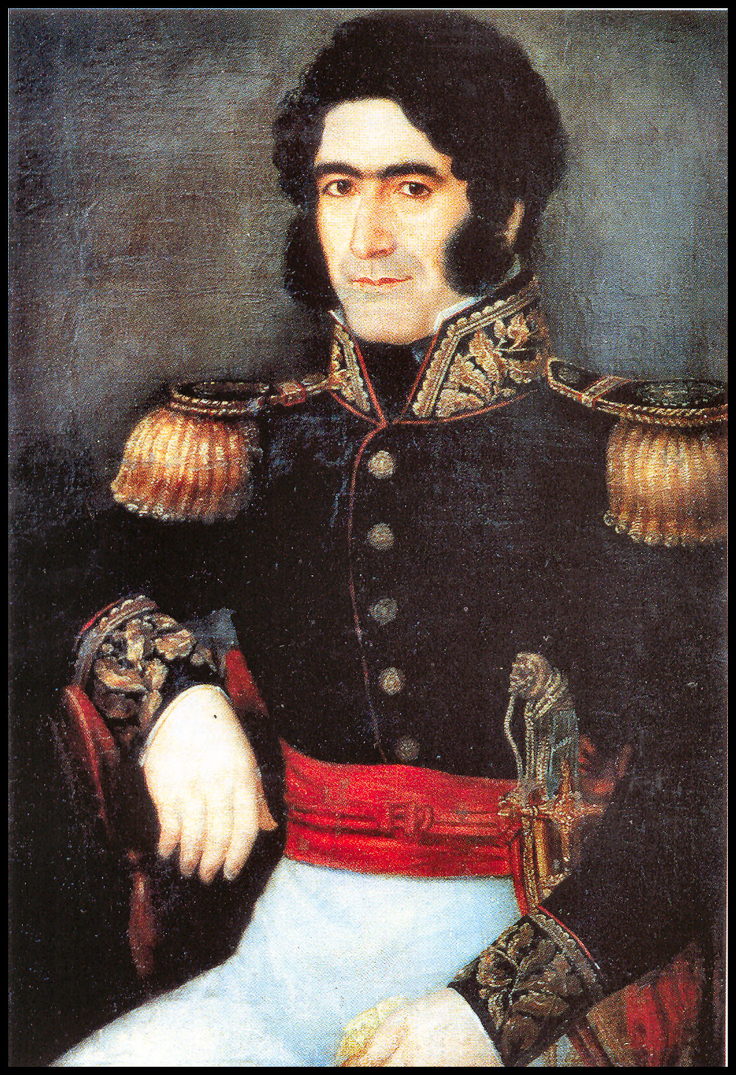 Brigadier General Celedonio Gutiérrez en la década de 1840. Óleo sobre tela expuesto en la Catedral de San Miguel de Tucumán. No está firmado, pero se le atribuye desde antiguo al pintor Ignacio Baz